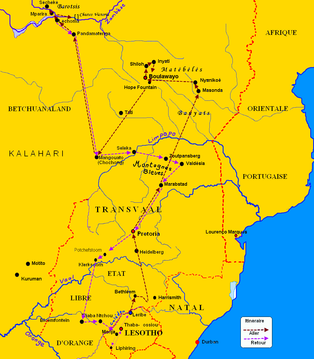 Voyage exploratoire du missionnaire français François Coillard au Zambèze.